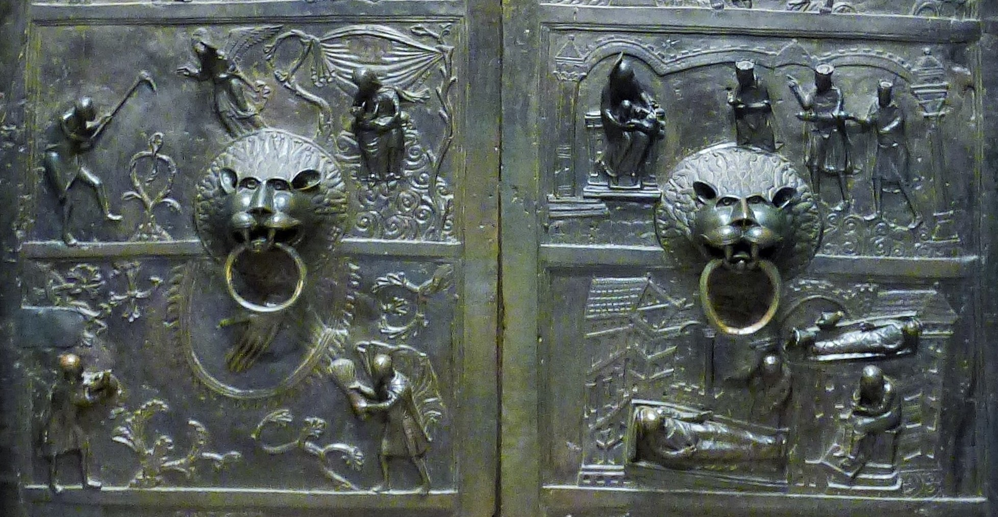 Mariendom Haupteingangstür aus Bronze